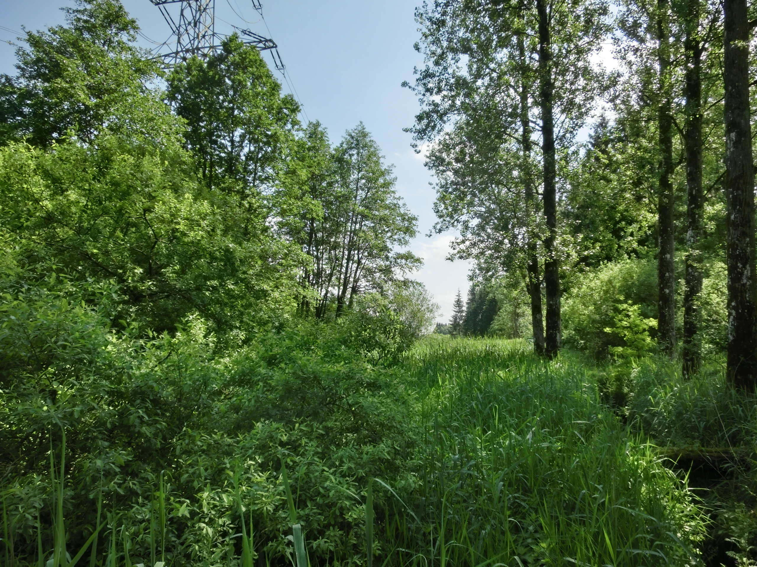 Deutschland - Baden-Württemberg - Landkreis Sigmaringen - Ostrach/Pfullendorf: LSG/NSG "Taubenried"